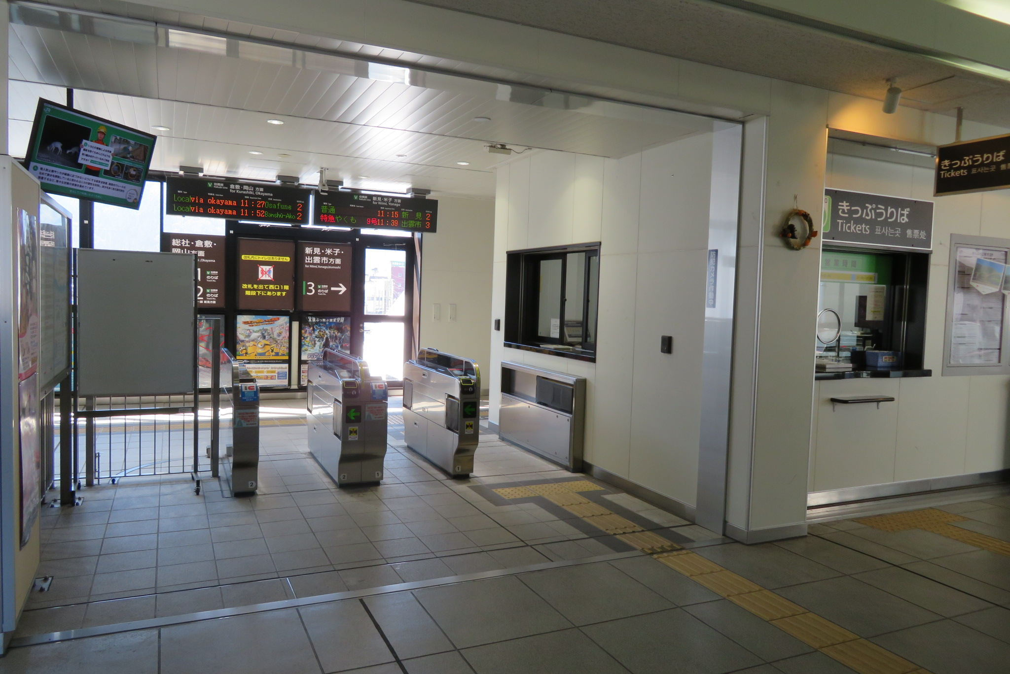 備中高梁駅改札口